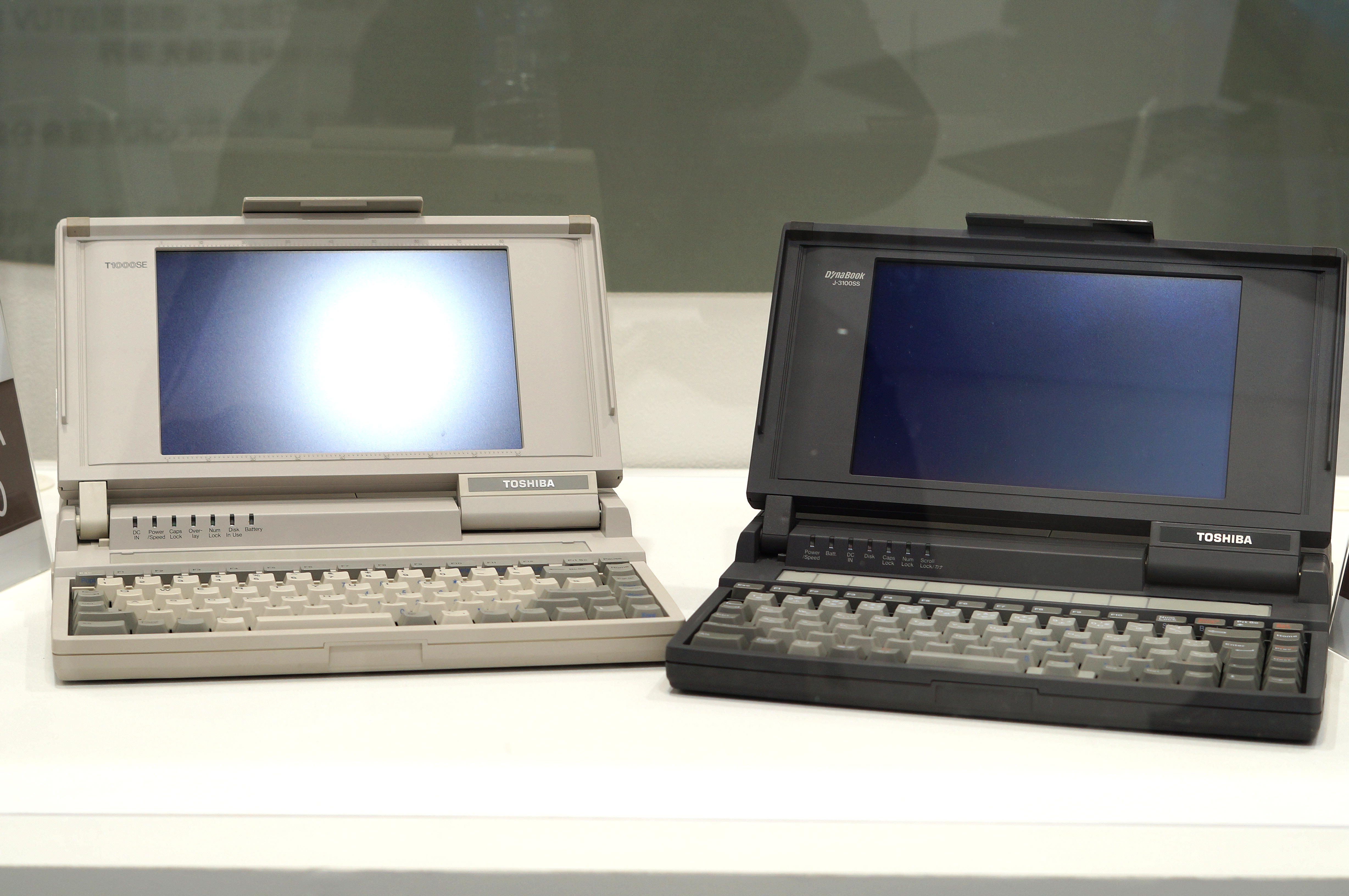 2019年台北資訊月，台灣夏普攤位展示的1985年東芝筆記型電腦T1000SE（左）、1989年東芝筆記型電腦DynaBook J-3100SS（右）。